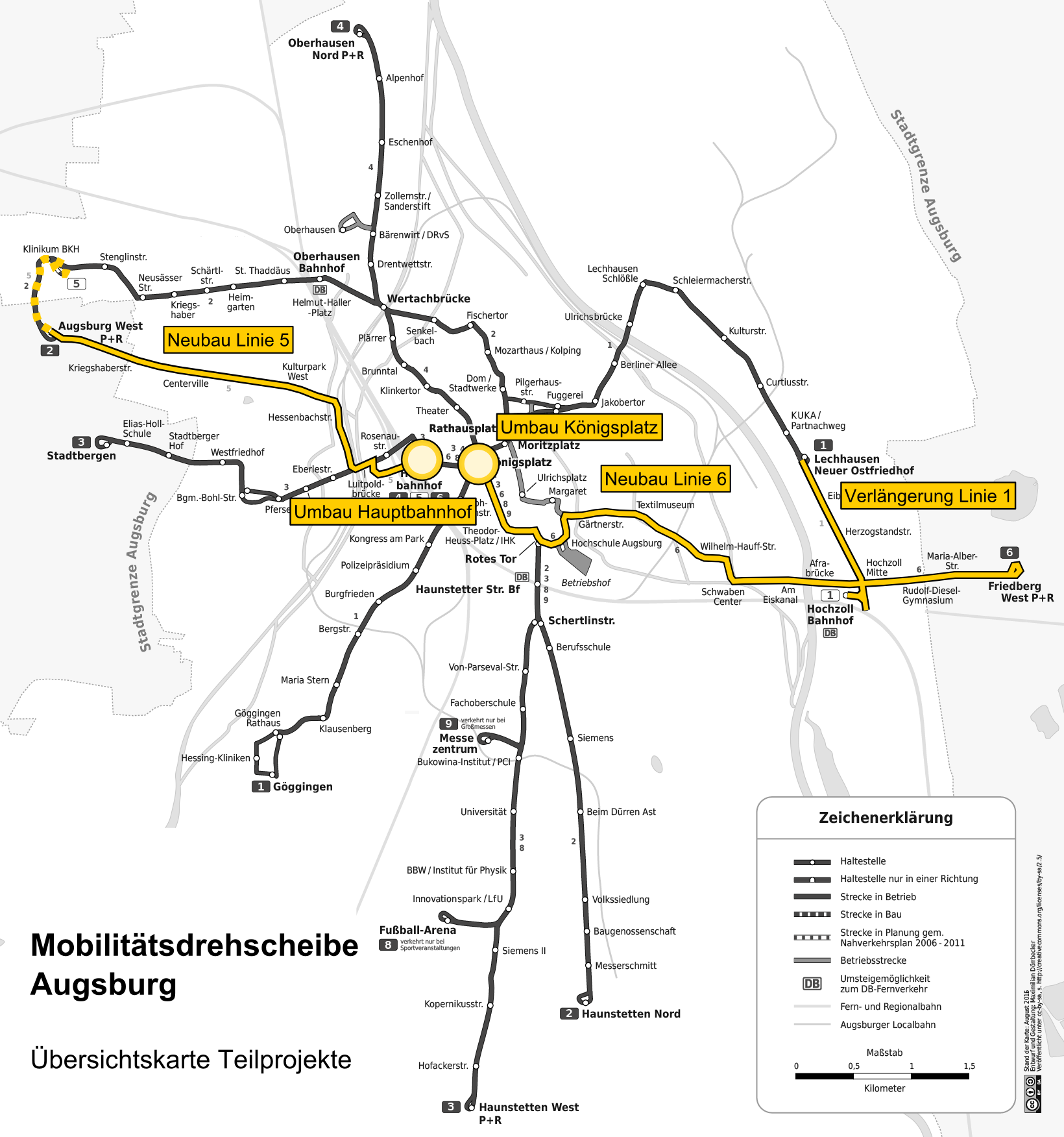 Übersichtskarte zu den Teilprojekten der Mobilitätsdrehscheibe Augsburg (Hintergrund: Netzplan der Straßenbahn Augsburg)